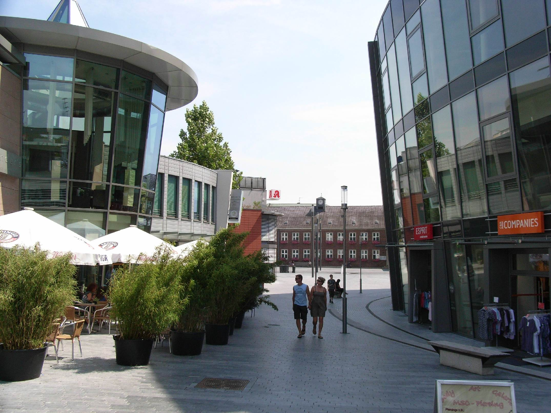 Hückelhoven, NRW